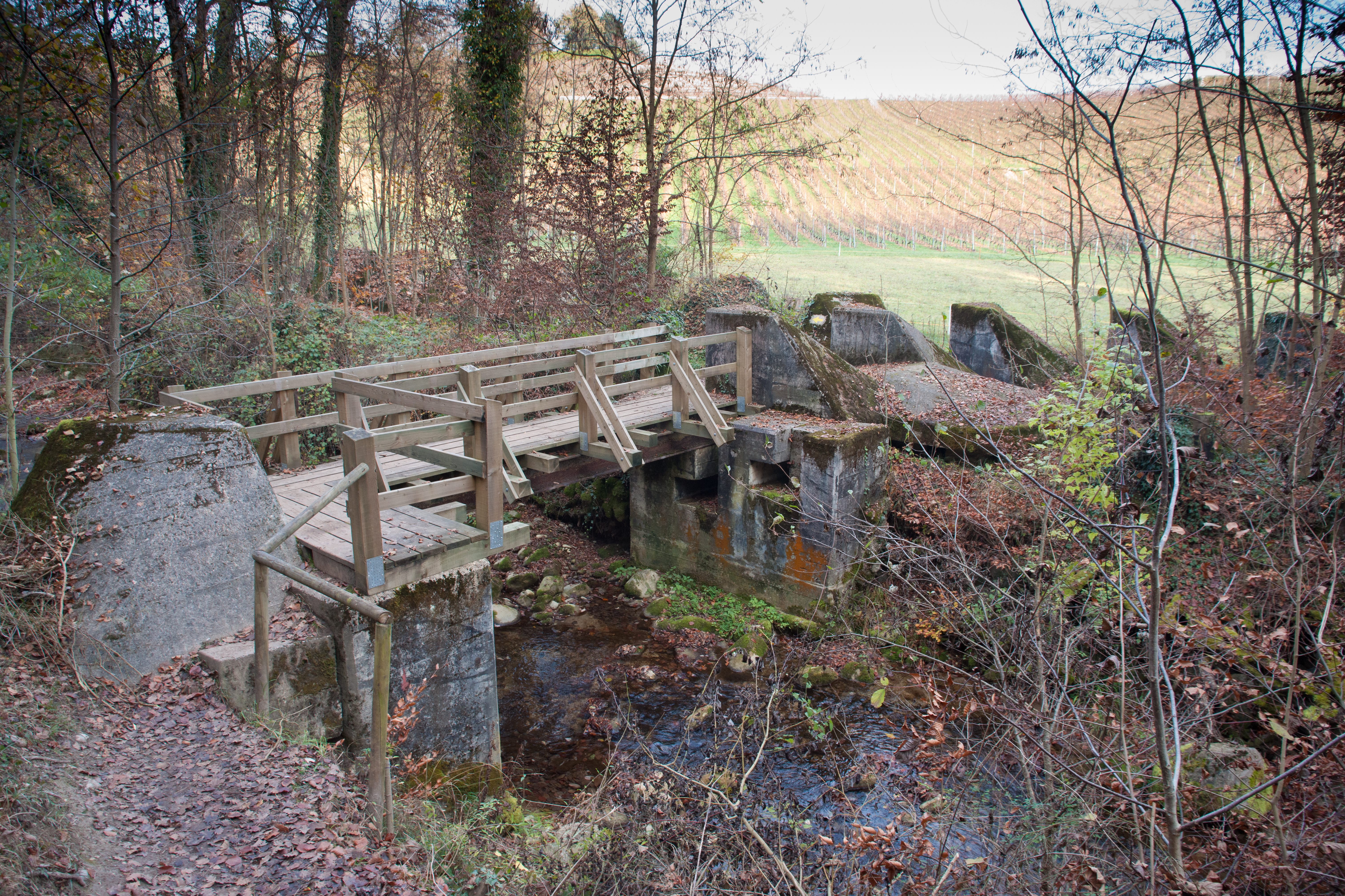 Ligne fortifiée de la Promenthouse - pont construit sur des toblerones anti-char.